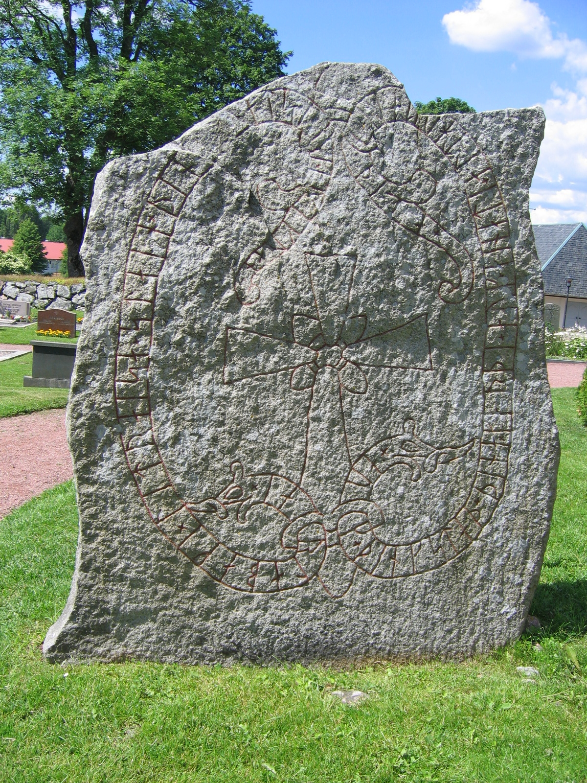 Runestone U 212 in Vallentuna.